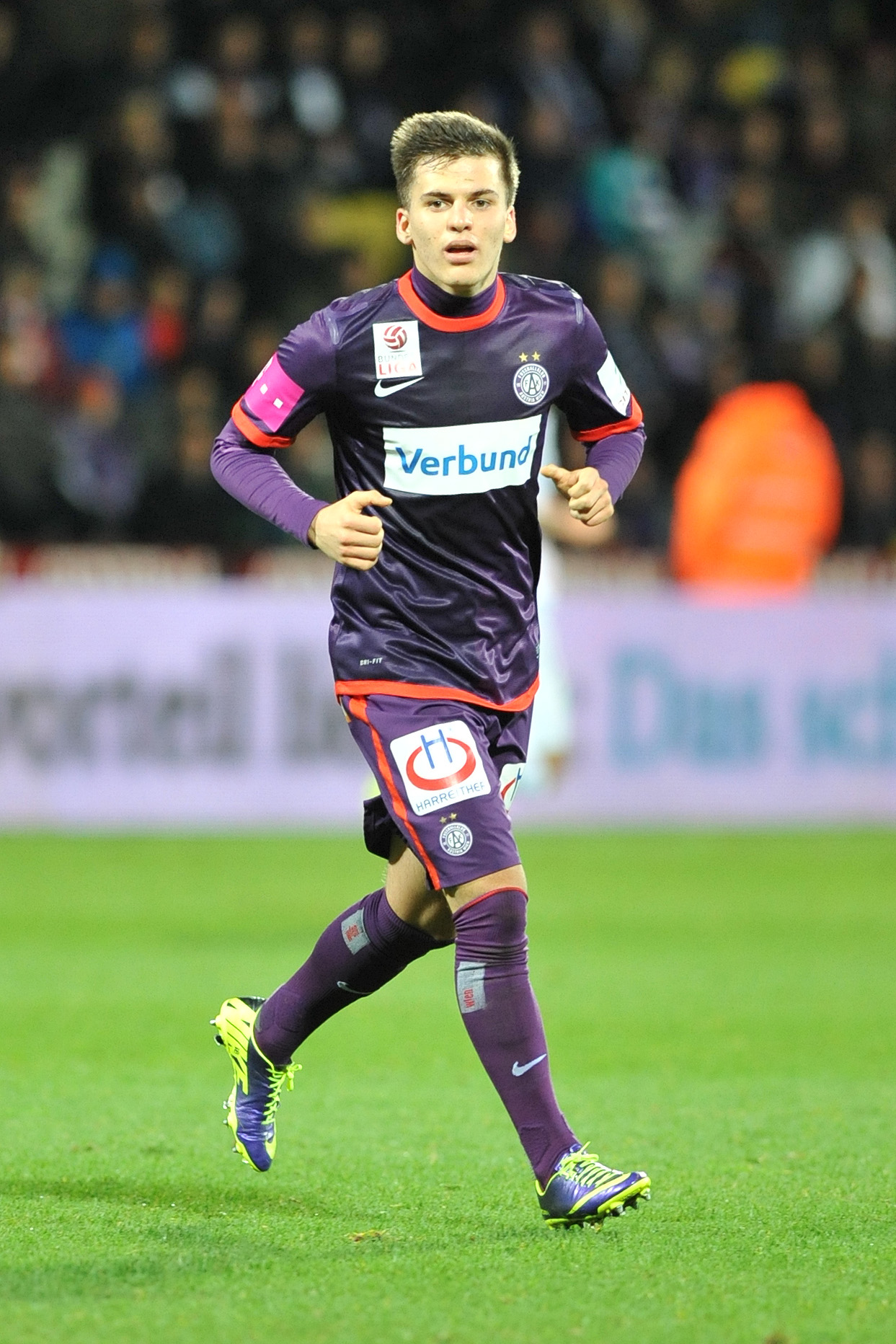 Bundesliga:FK Austria Wien - RZ Pellets WAC Thomas Murg